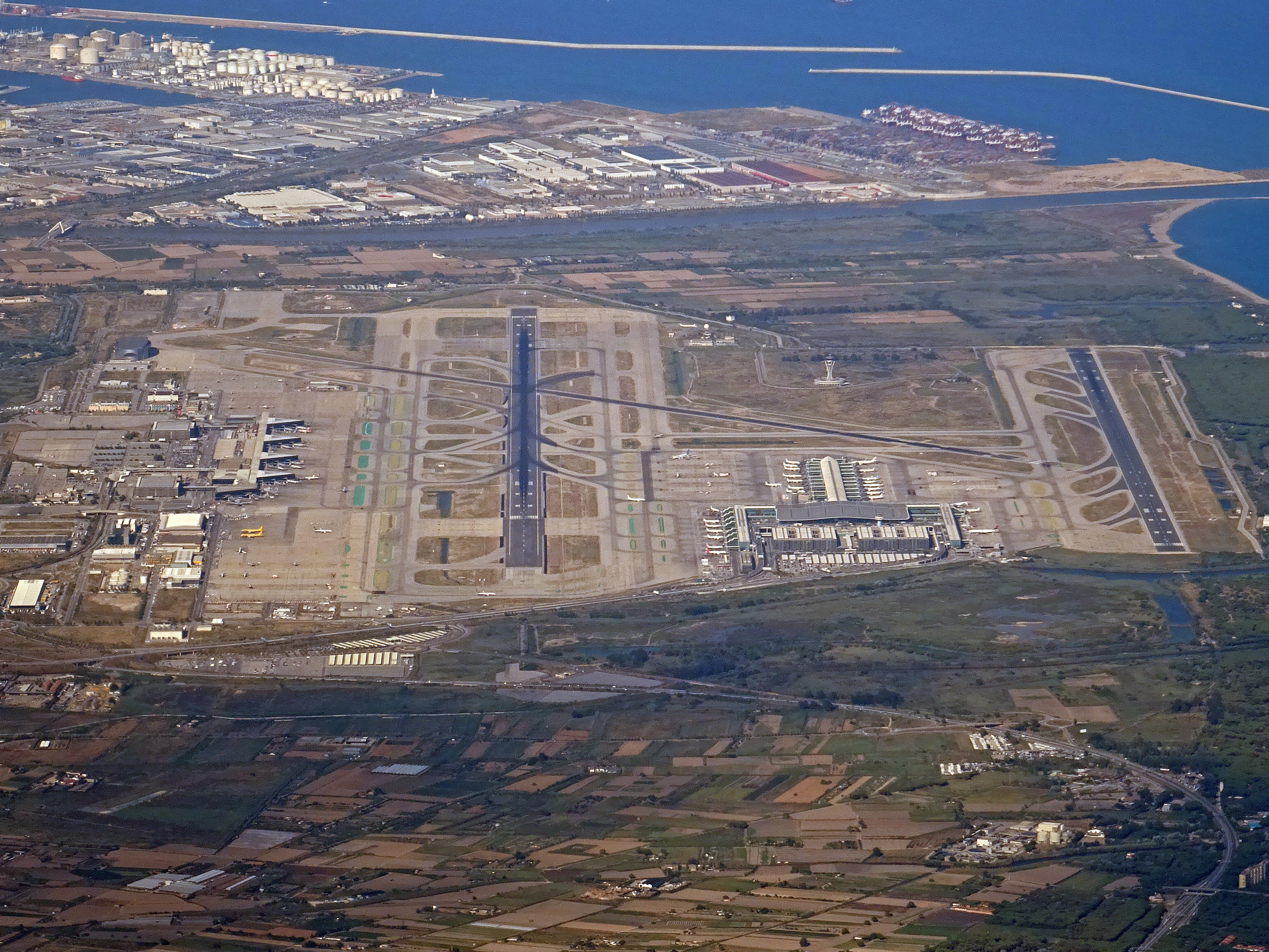 FLIGHT VUELING 8020